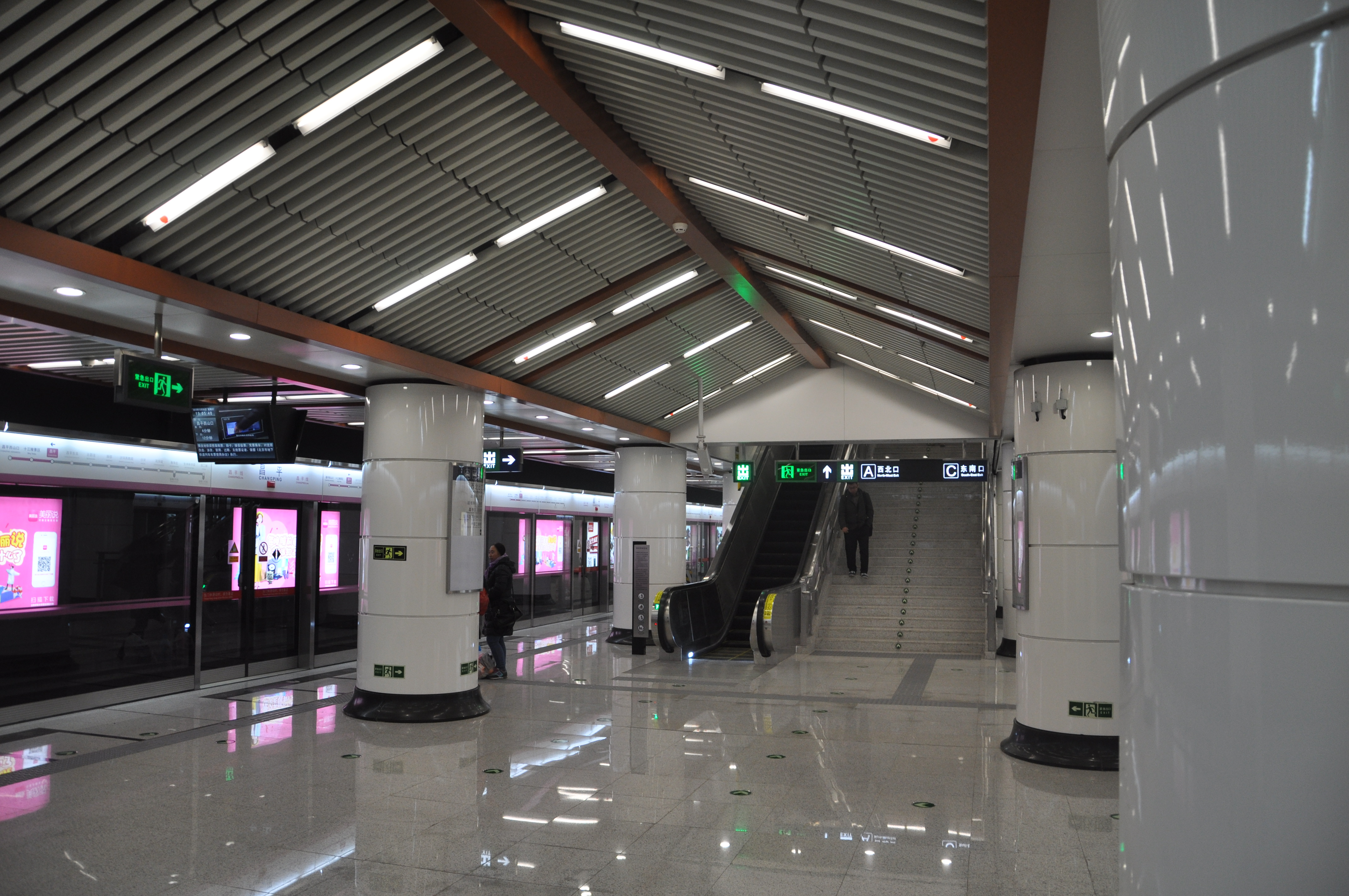 北京地铁昌平线昌平站站台。